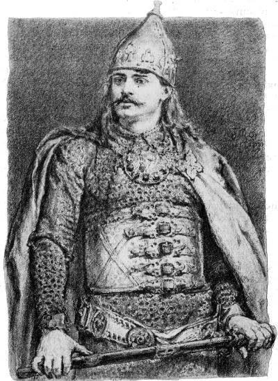 Part of series Poczet królów i książąt polskich.